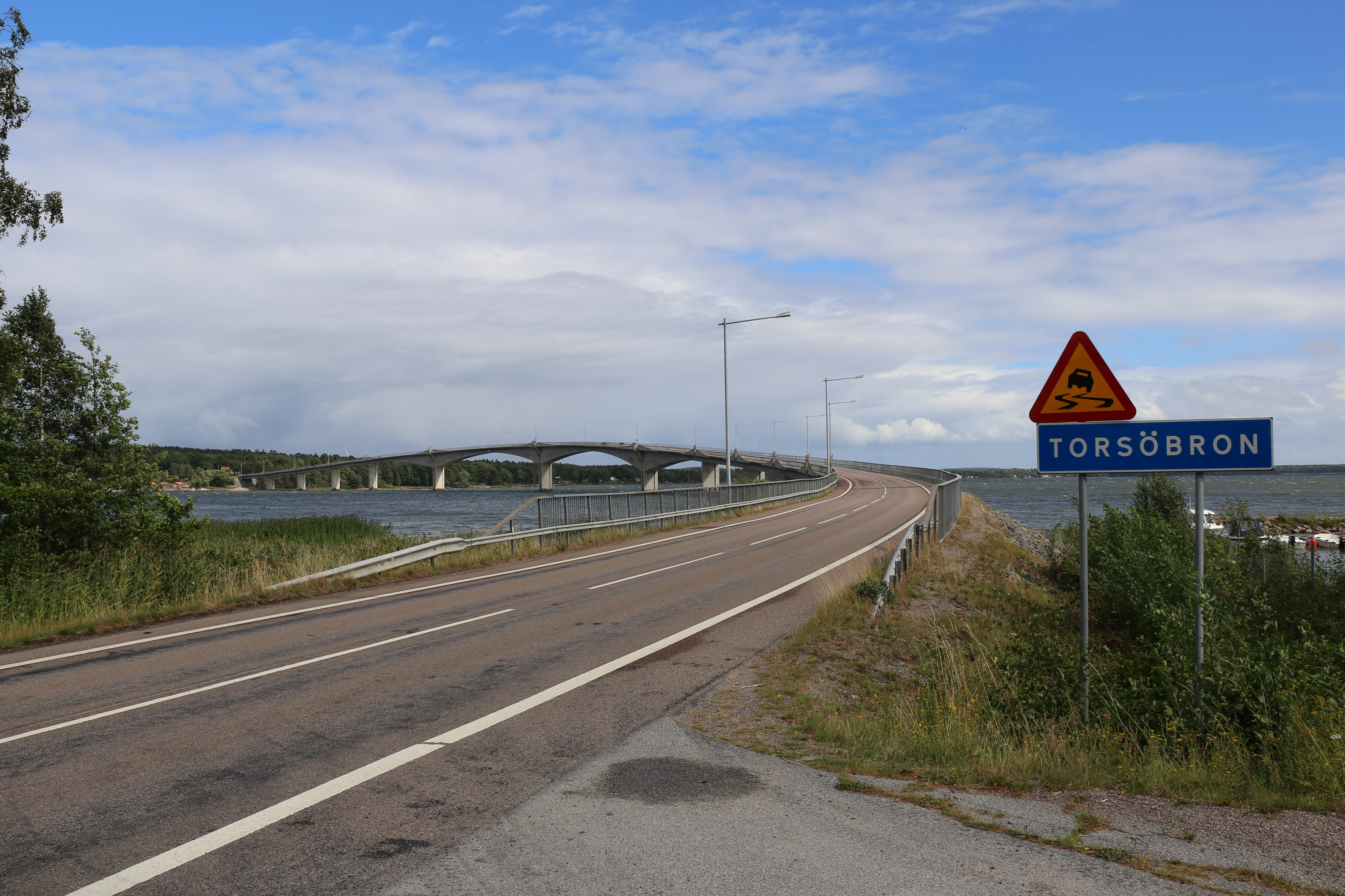 Torsöbrücke